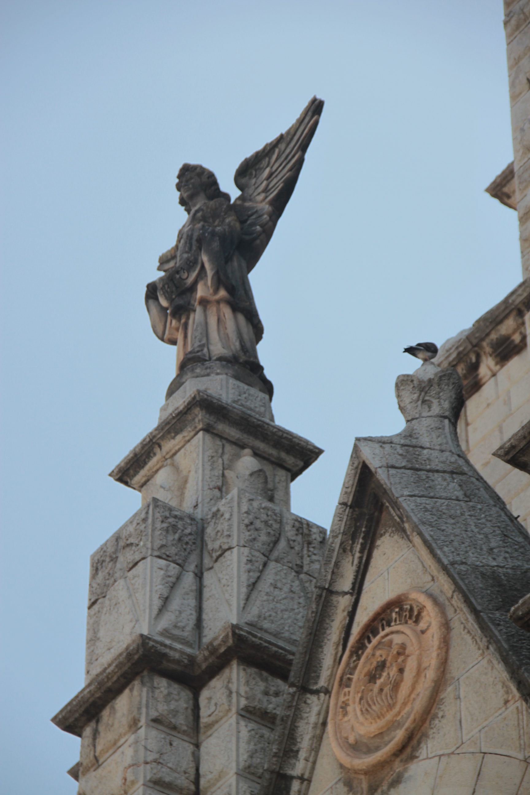 Церква святого Варфоломія (Церква Сант-Бартомеу), Сольєр, Мальорка, Іспанія.